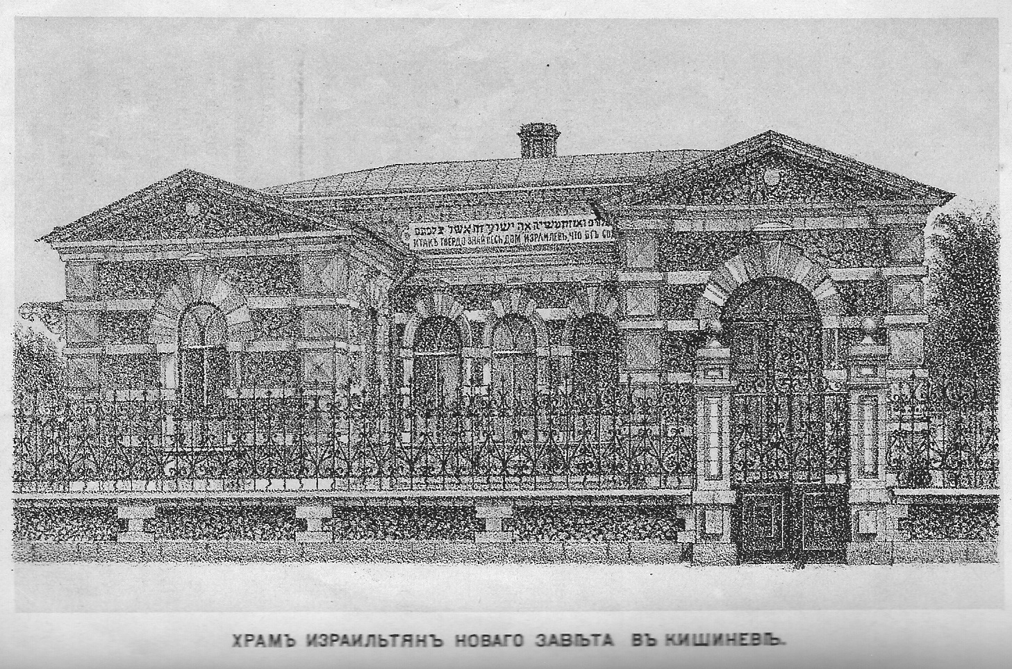 Храм израильтян Нового Завета в Кишинёве (открыт в 1890 году)